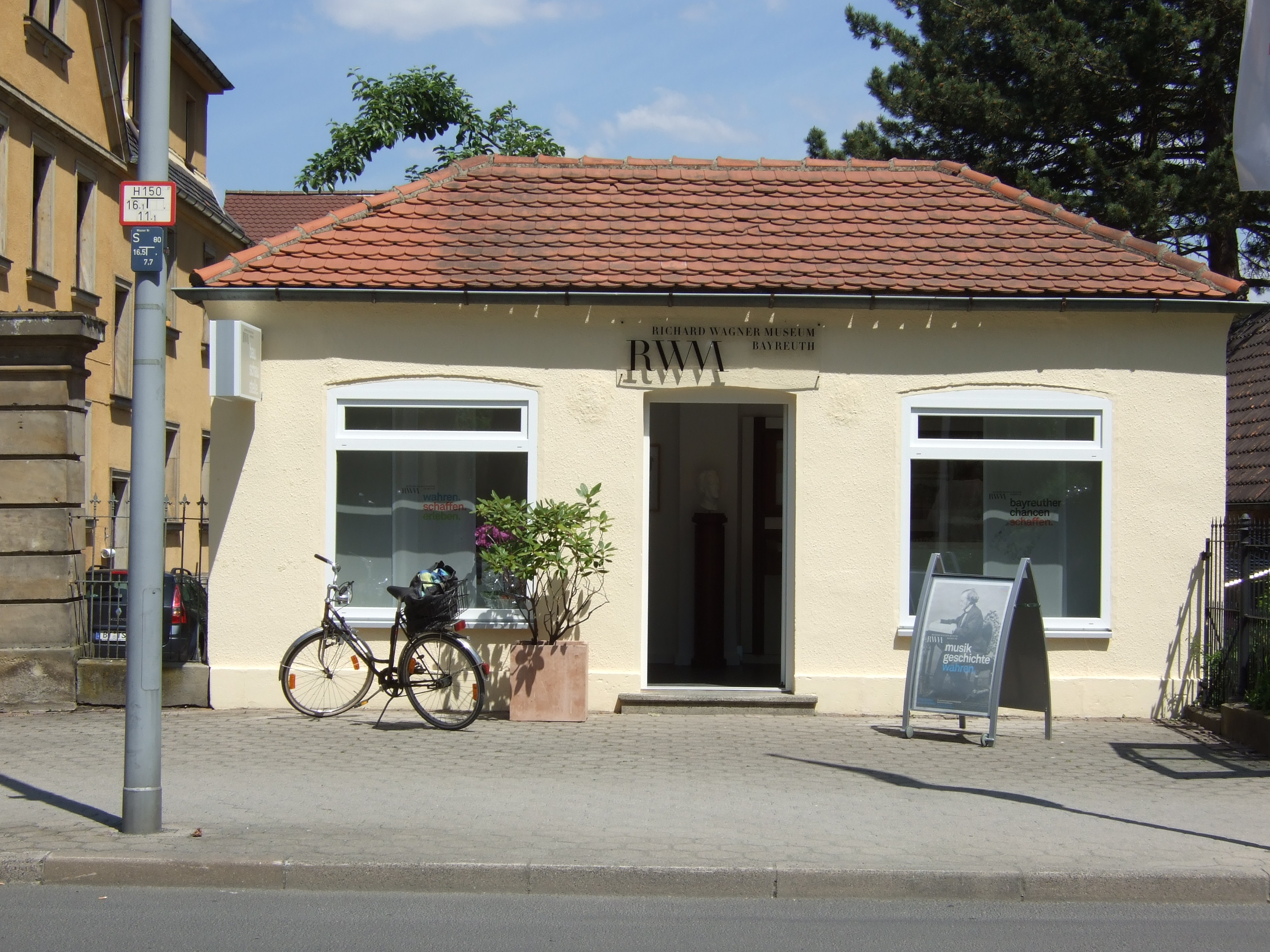 Infopoint Richard-Wagner-Museum Bayreuth in ehemaligen Milchhäuschen auf dem Grundstück Richard-Wagner-Straße 45